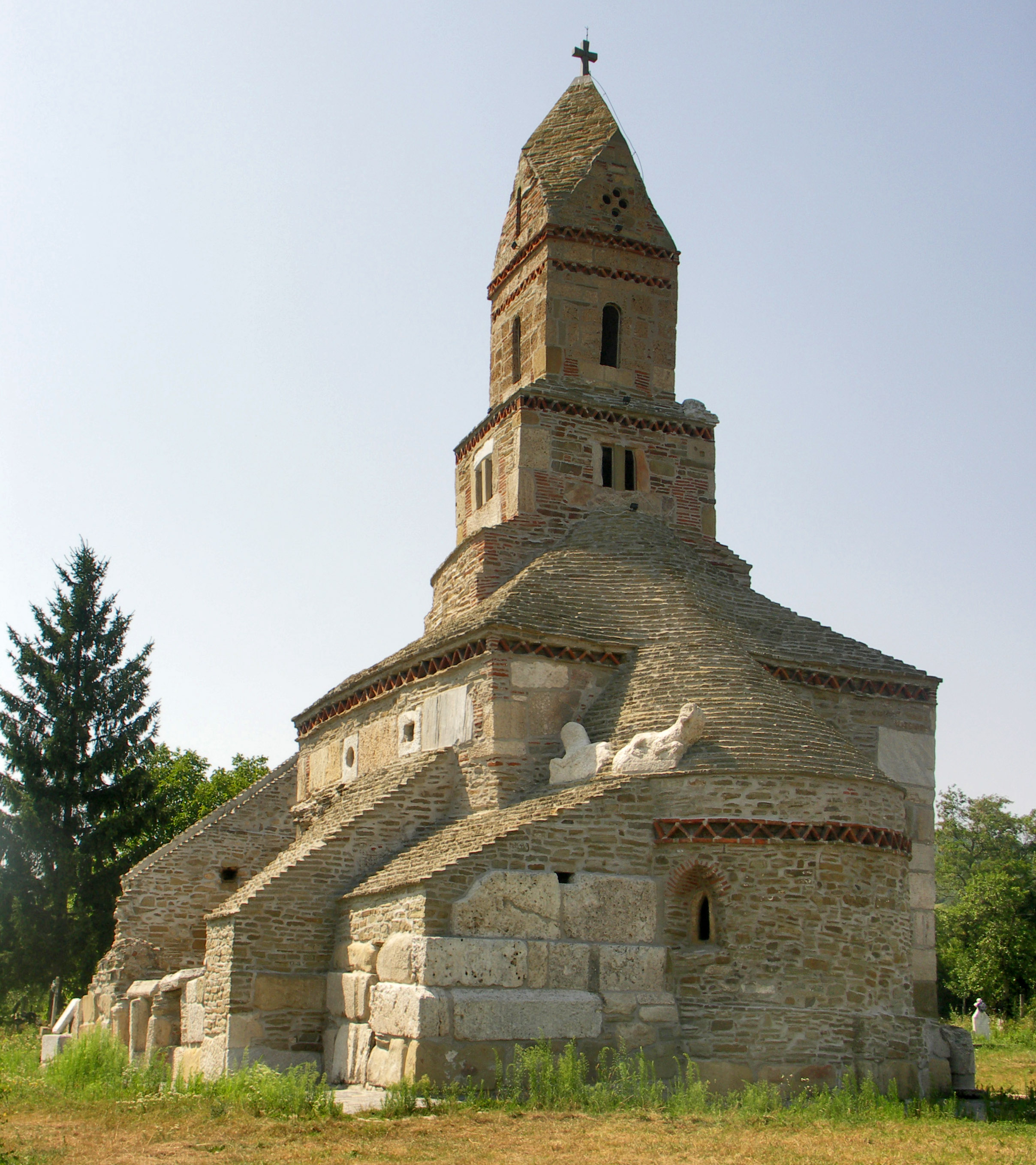 Densuş, Hunedoara: biserica de piatra medievală. Exteriorul bisericii, vedere dinspre sud-est.